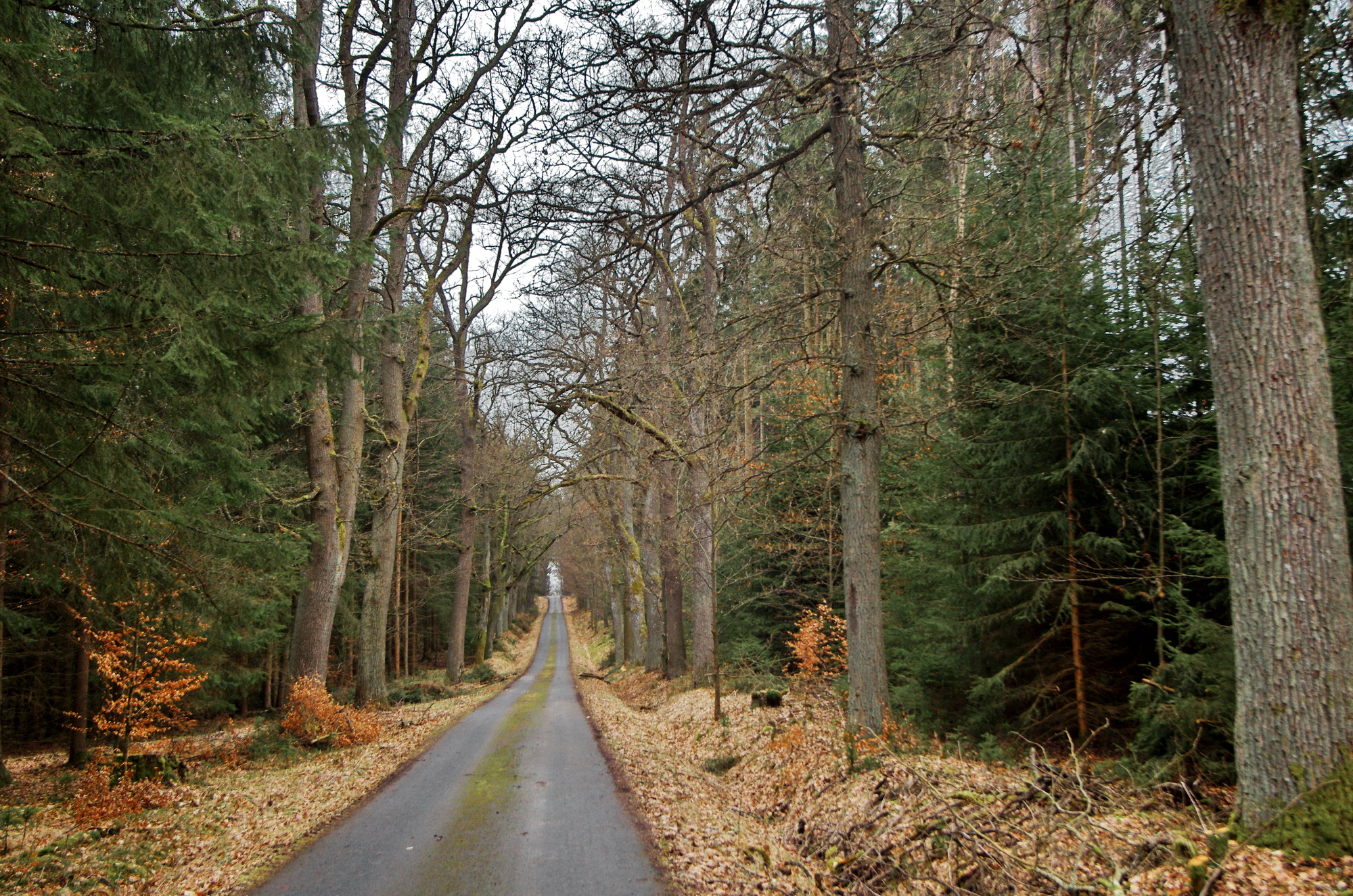 Památné stromy - Alej Svobody, mezi Mariánskými Lázněmi a Lázněmi Kynžvart, okres Cheb